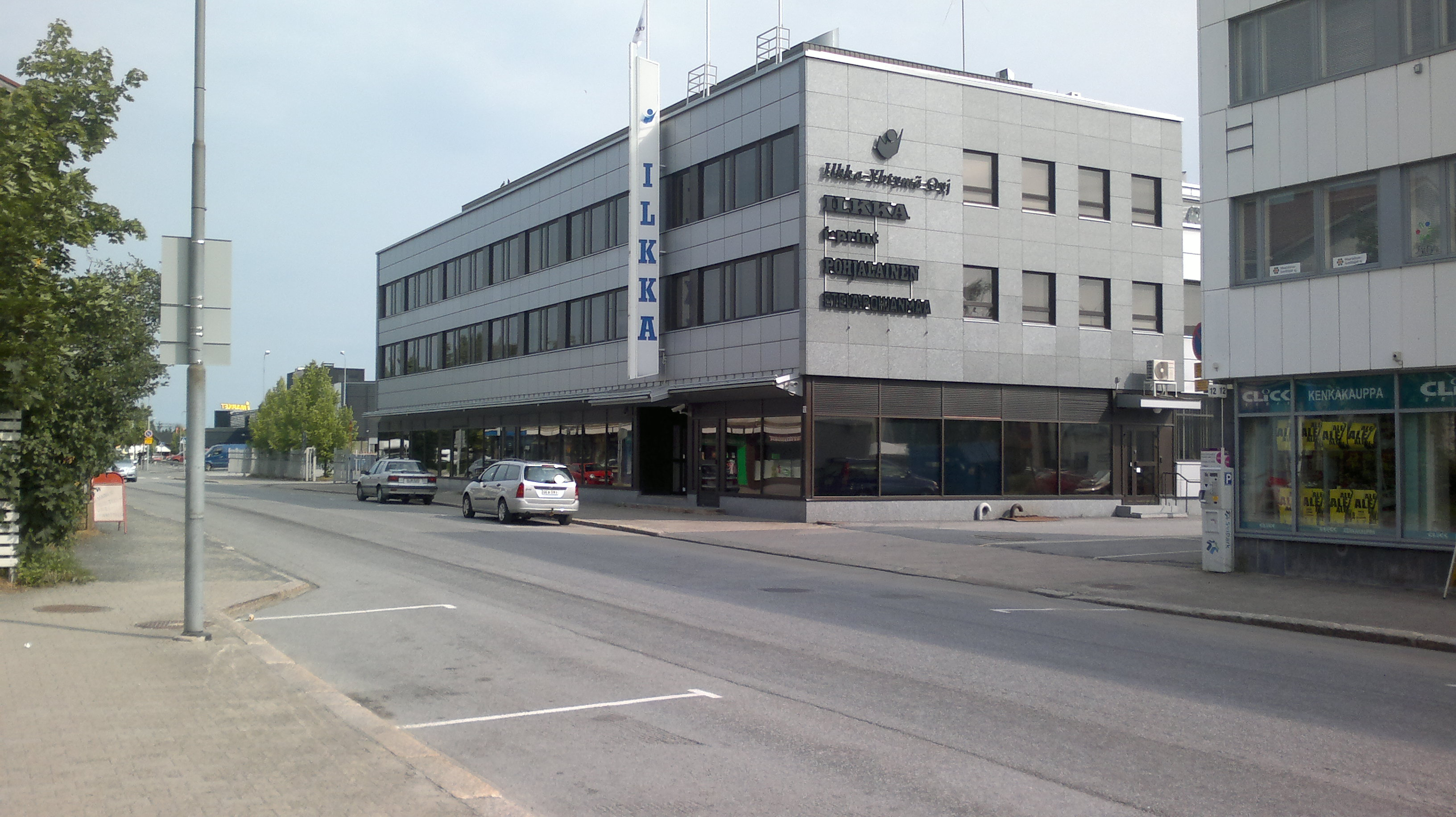 Ilkka-Yhtymä Oyj:n pääkonttori Seinäjoella.